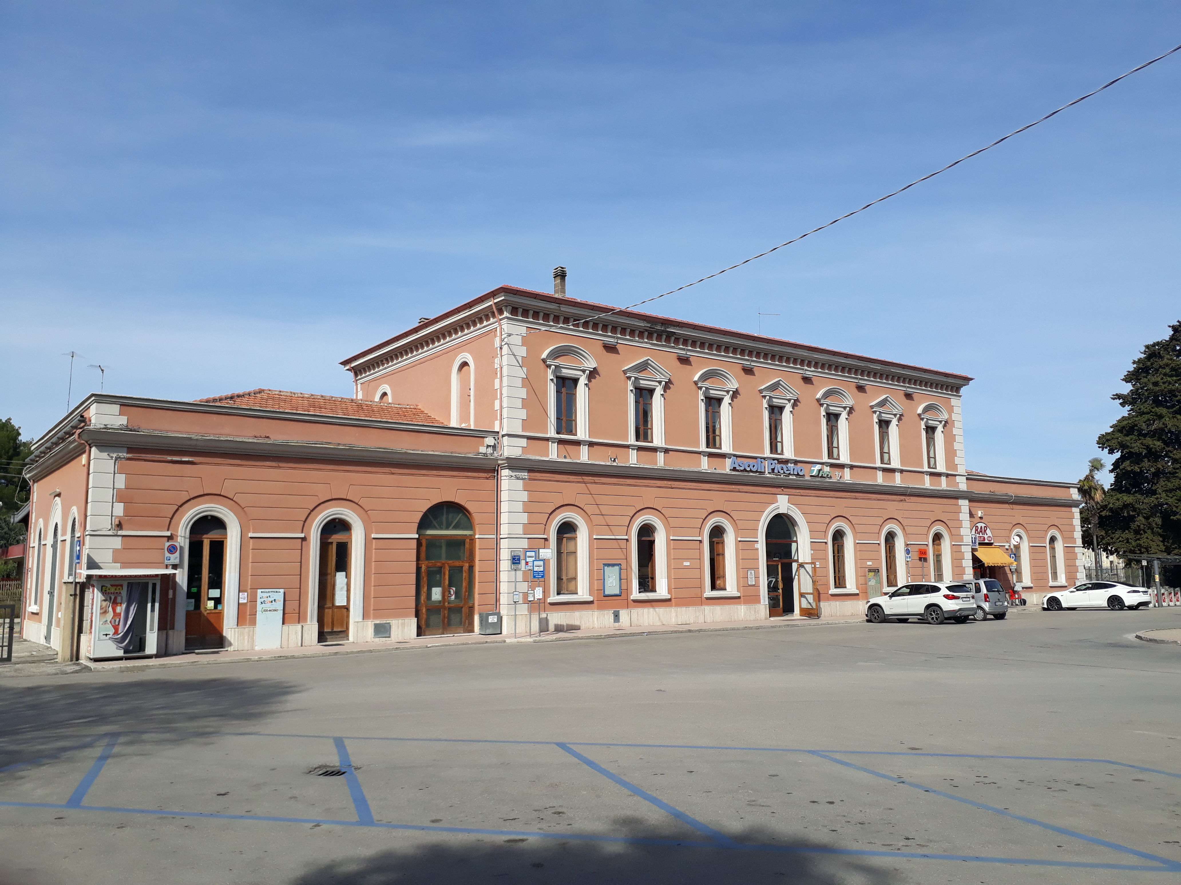 La stazione ferroviaria di Ascoli Piceno.